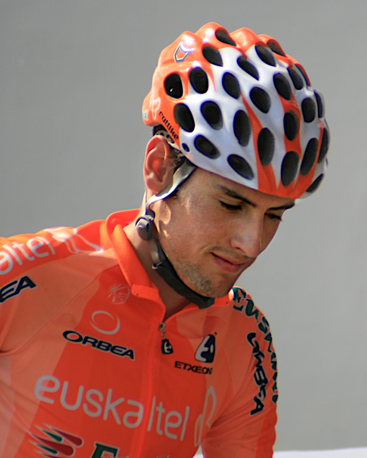 Andoni Lafuente, à l'Eneco Tour 2008, à Ardooie